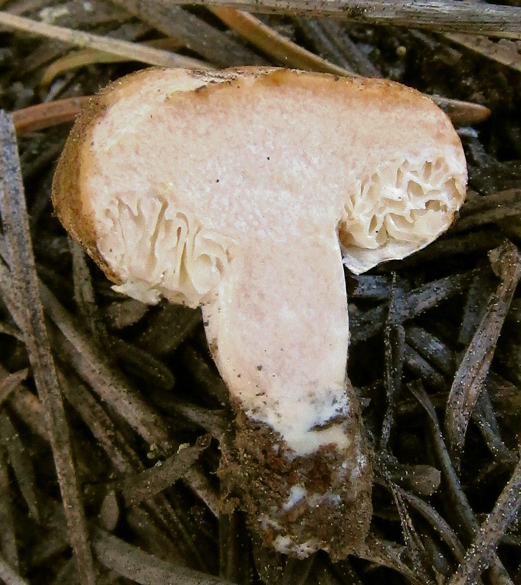 Arcangeliella crassa Singer & A.H. Smith